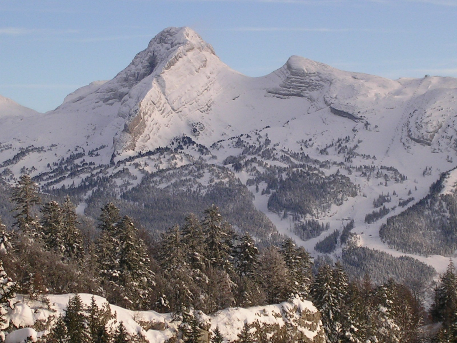 Espace Villard-Corrençon (38) : Le secteur du Clos de la Balme.